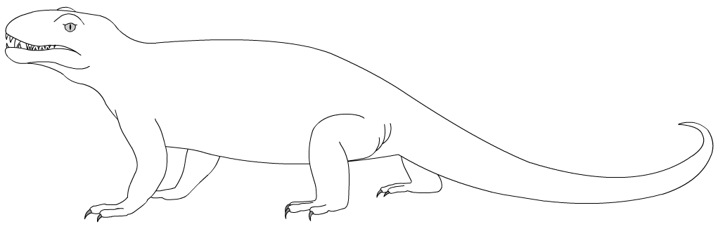 Phtinosuchus